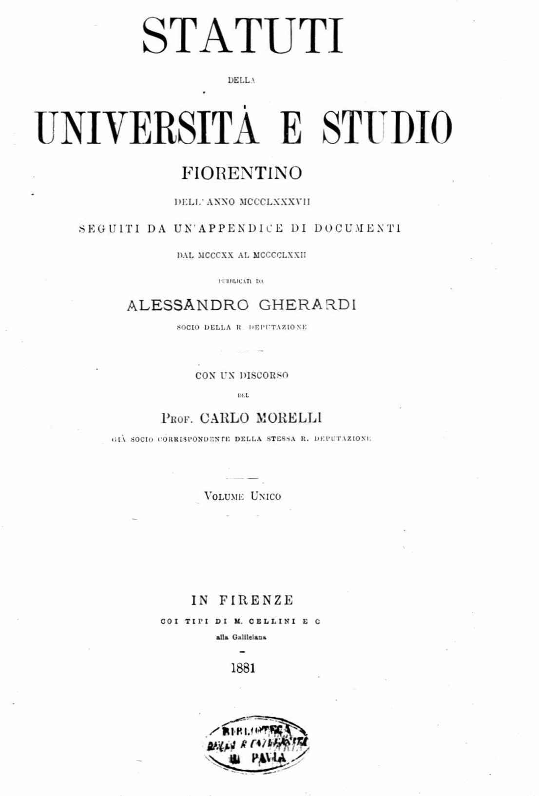 Frontespizio